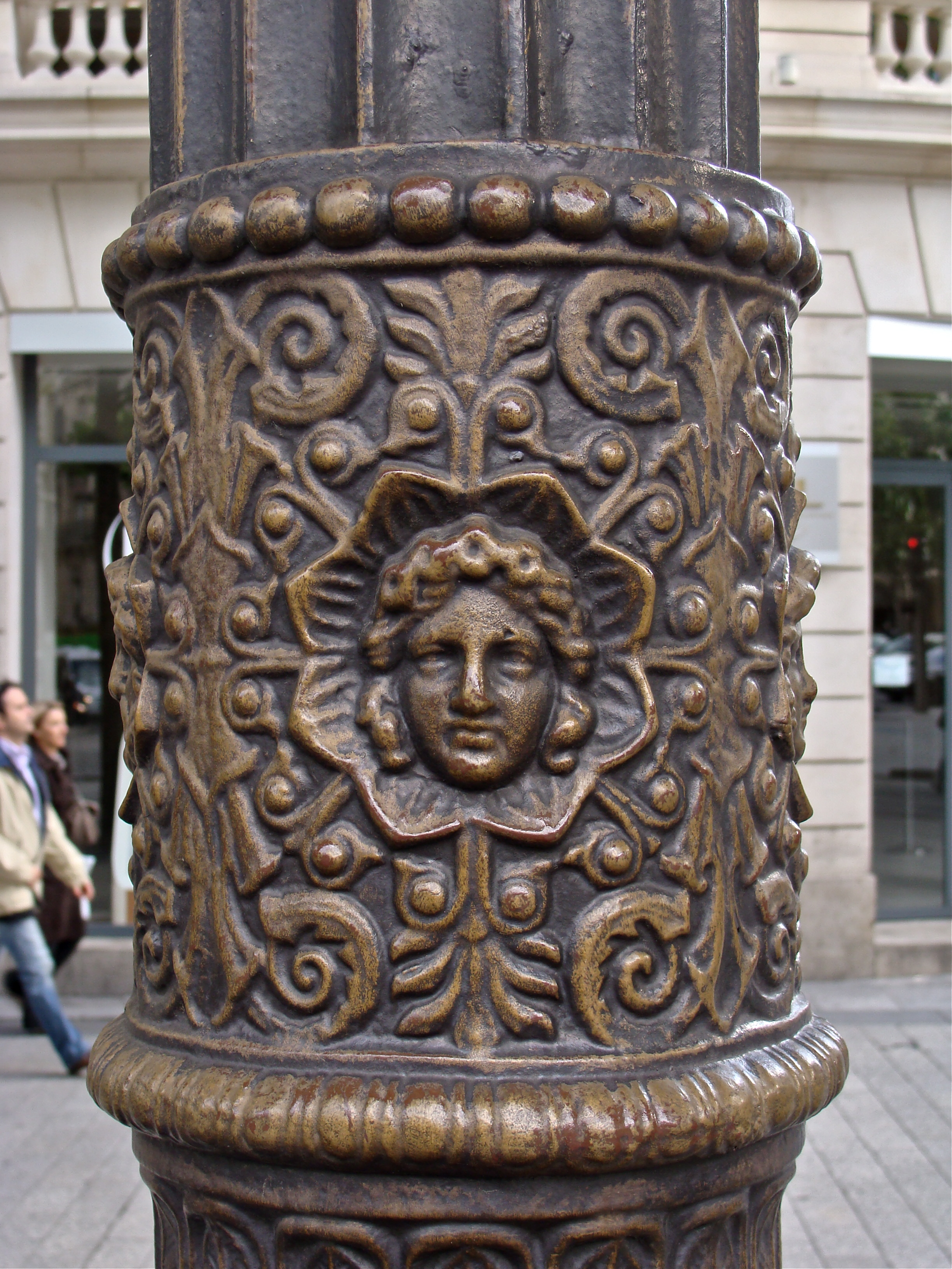 detail of a street lamp in Paris, Avenue des Champs Elysées